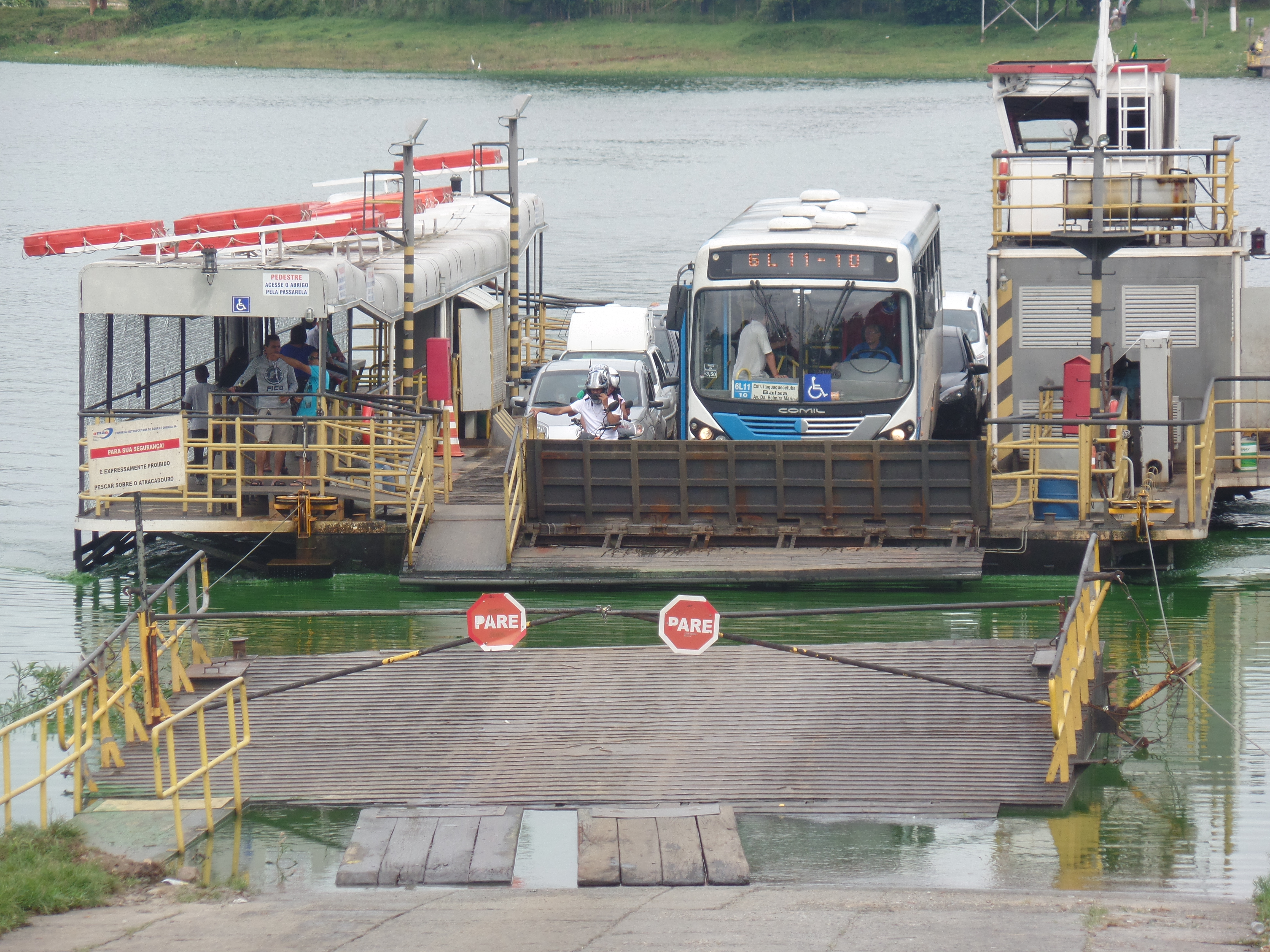 1ª Balsa Ilha do Bororé